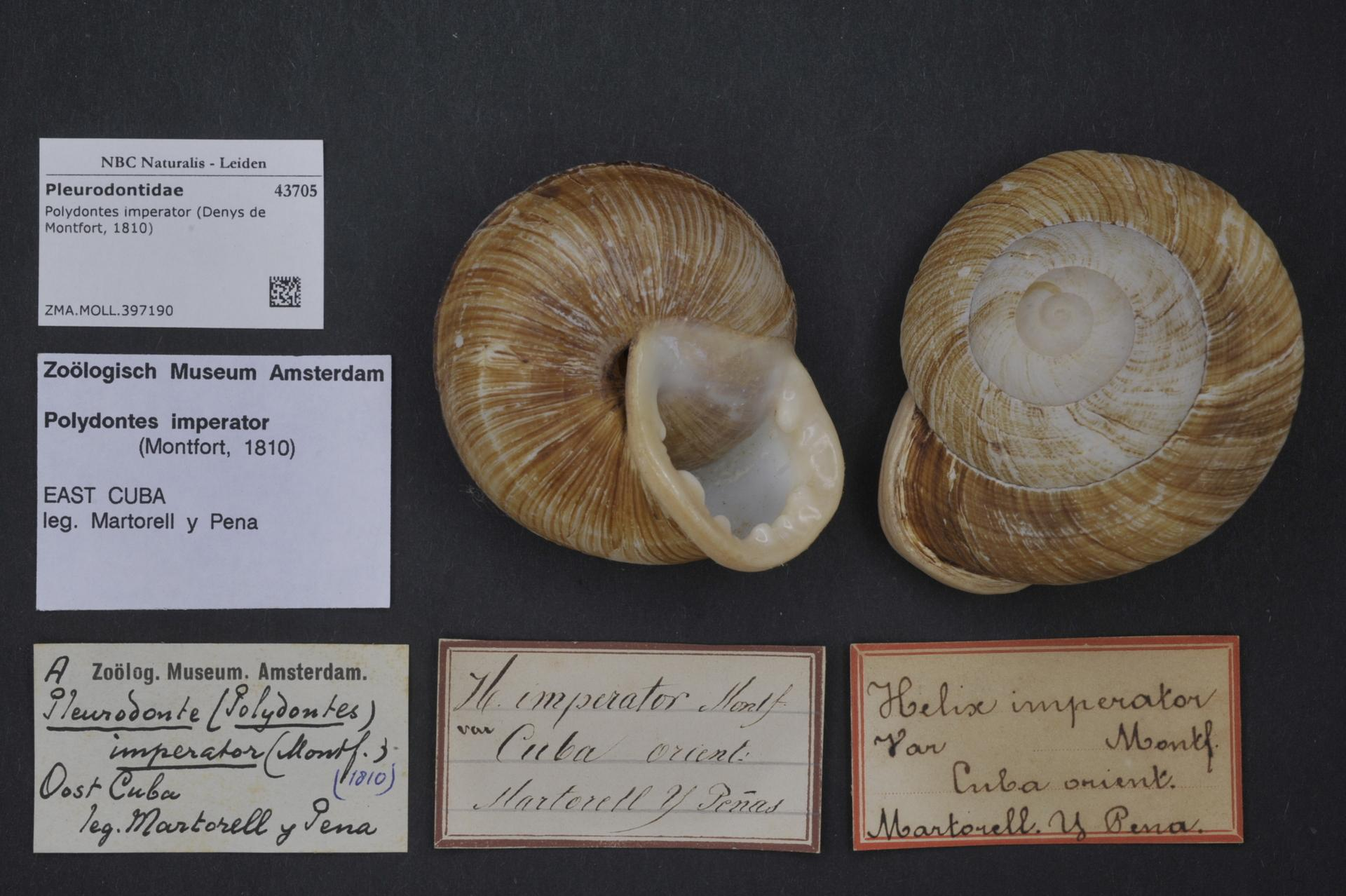 Polydontes imperator (Denys de Montfort, 1810)